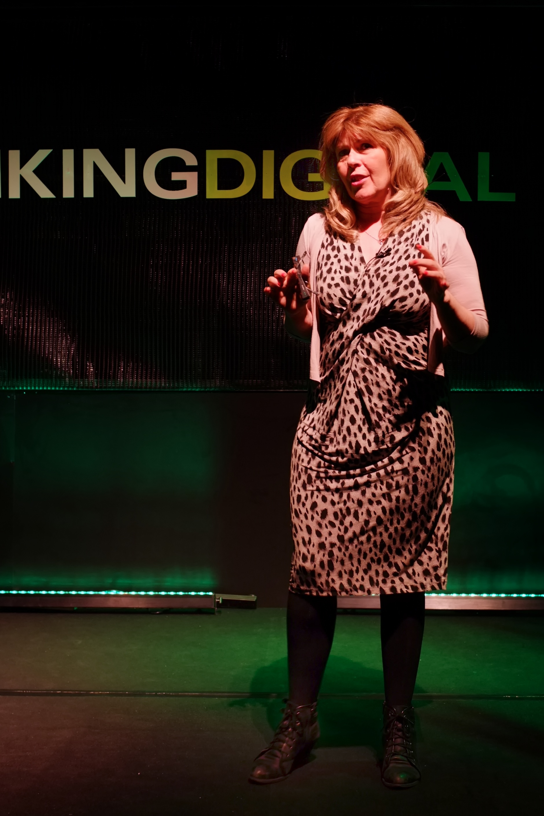 Maggie Philbin at Thinking Digital 2013